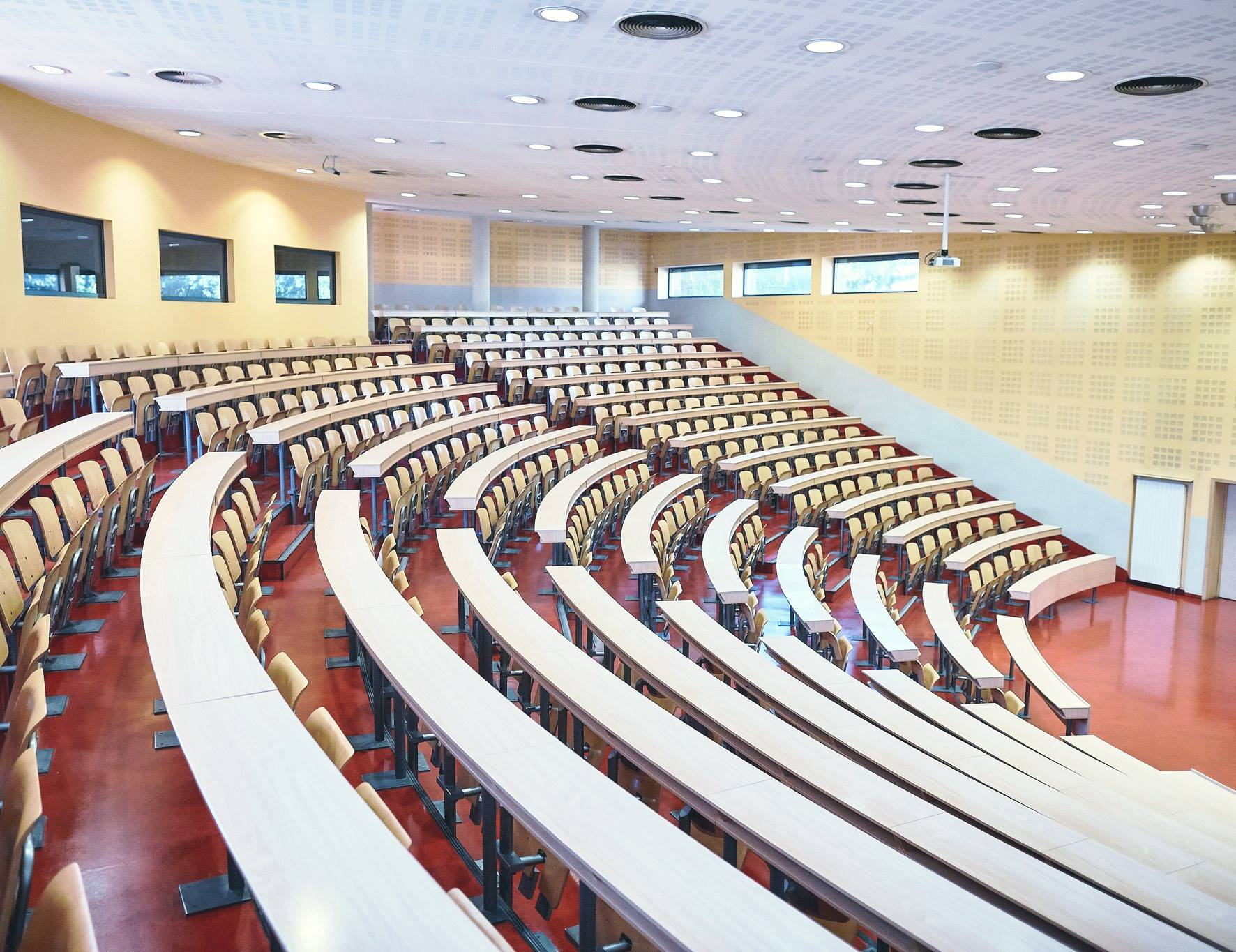 Aula wykładowa na Wydziale